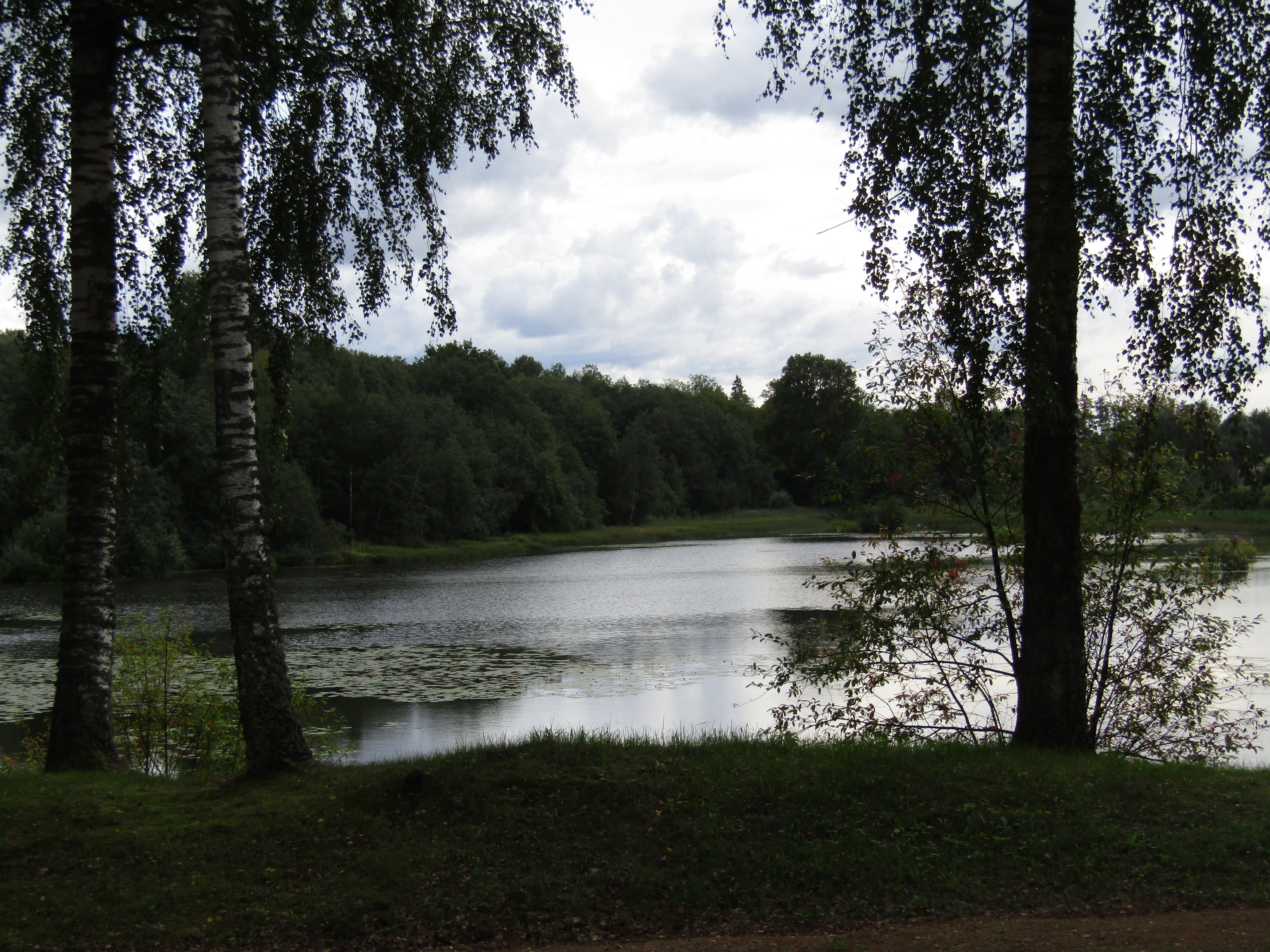 Ziemeļvidzemes biosfēras rezervāts